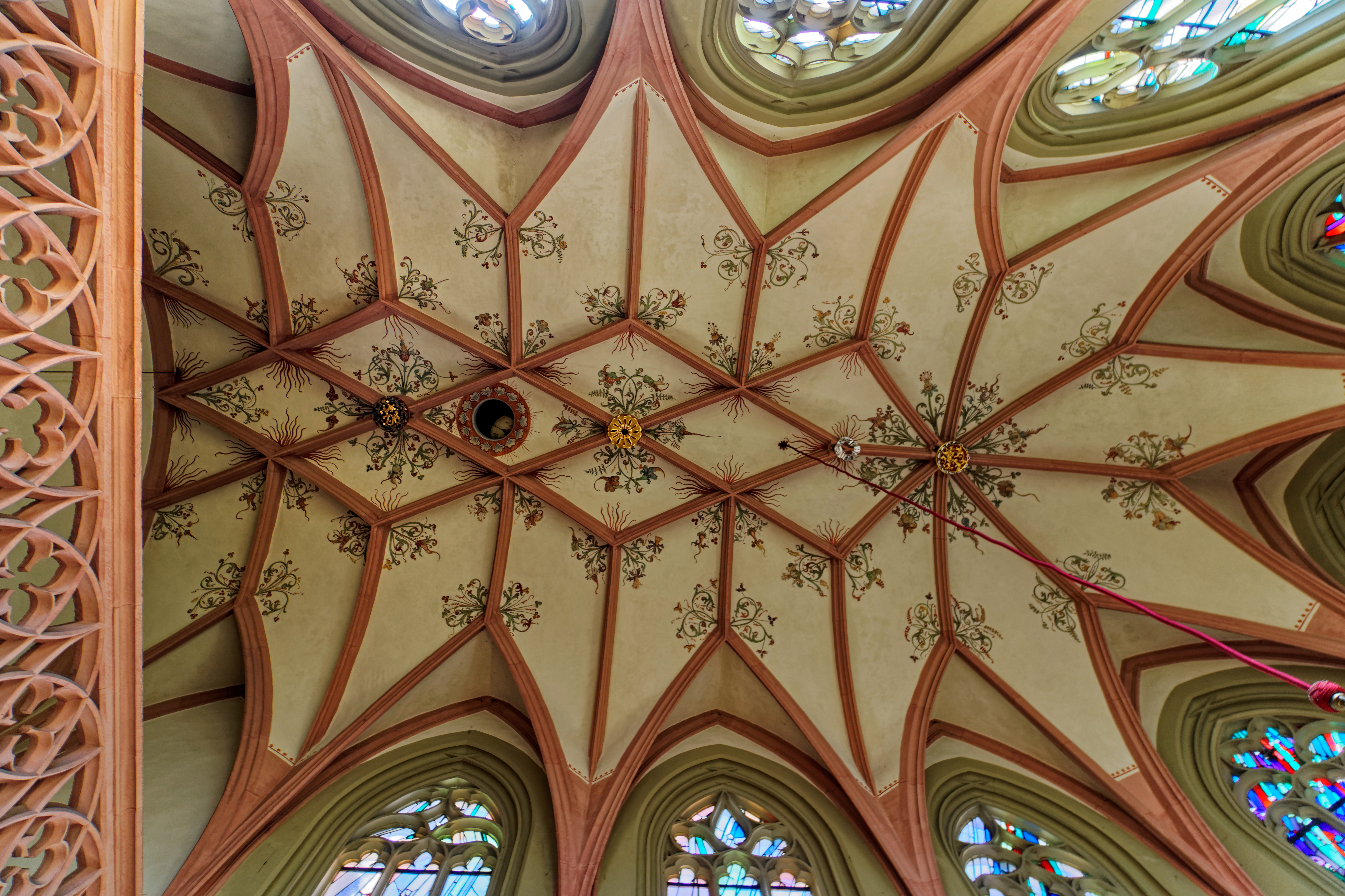 Interior of the chapel St. Michael in Ochsenfurt.